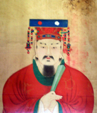 King Kyungsoon of Silla